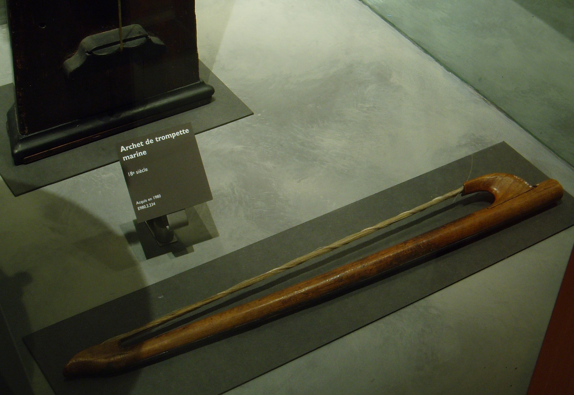 Archet de trompette marine, bow of trumpet marine, Trumscheit, Nonnengeige - France, XVIIIth century - Paris, musée de la musique